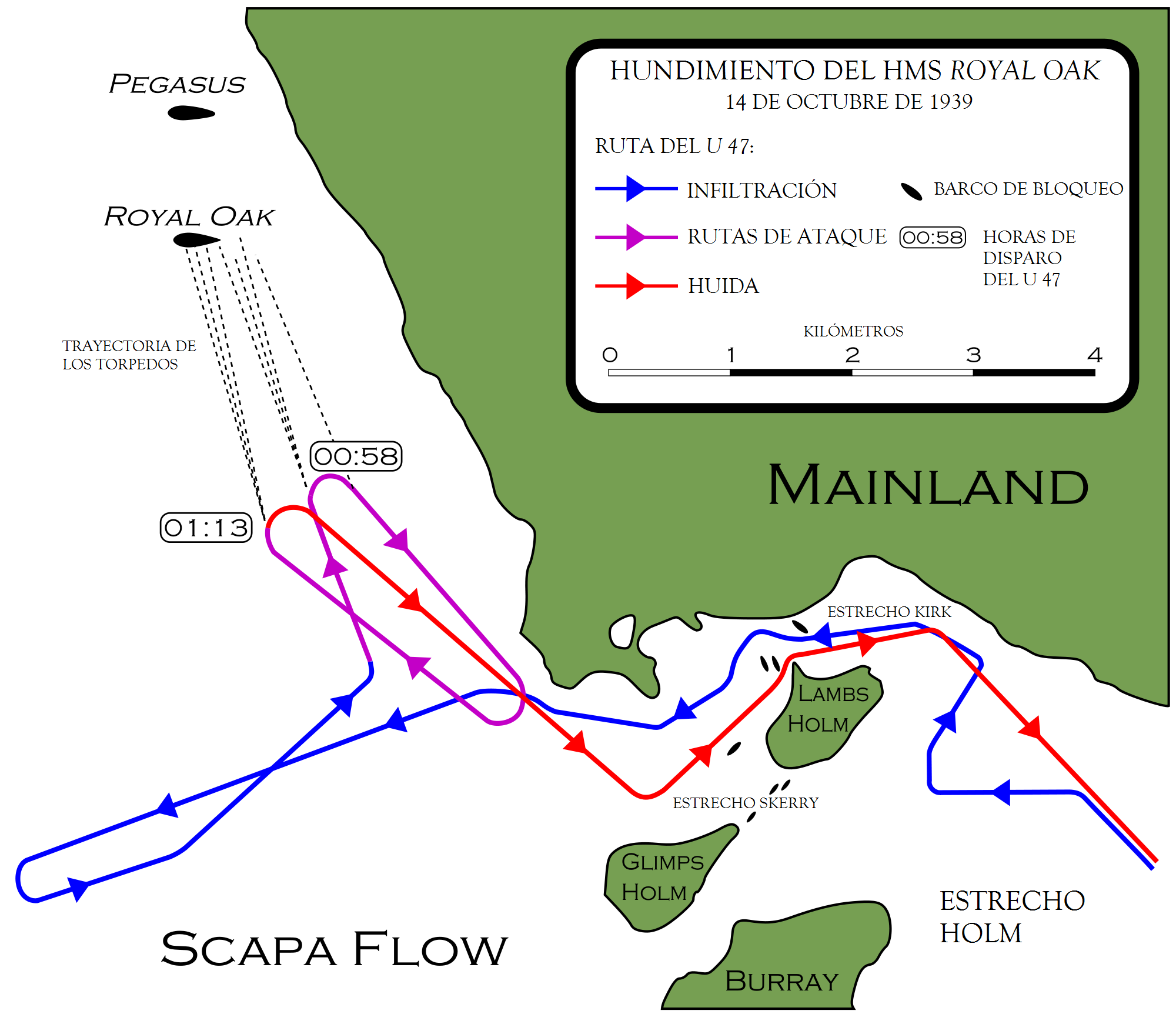 Mapa que detalla la infiltración del U 47 en Scapa Flow y el hundimiento del acorazado Royal Oak.